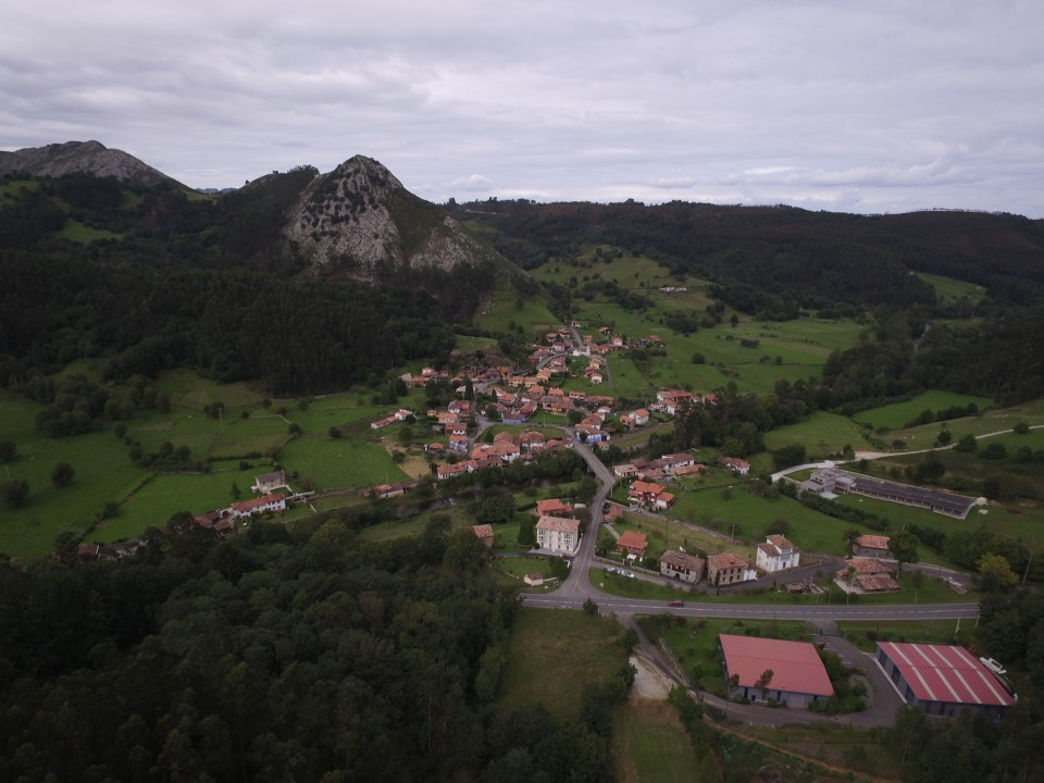 Vista aérea del Valle del Bedón, pueblo de Rales (Llanes).